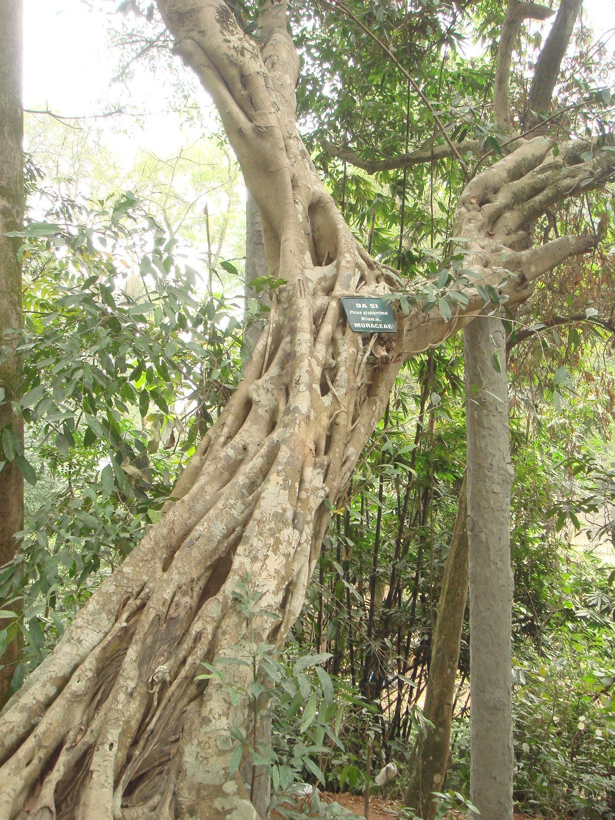 Cây đa nhẵn ở đền Hùng